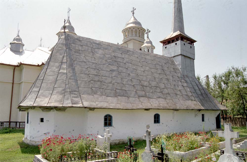 Biserica de lemn din Chechiş, Sălaj. Faţada de nord.